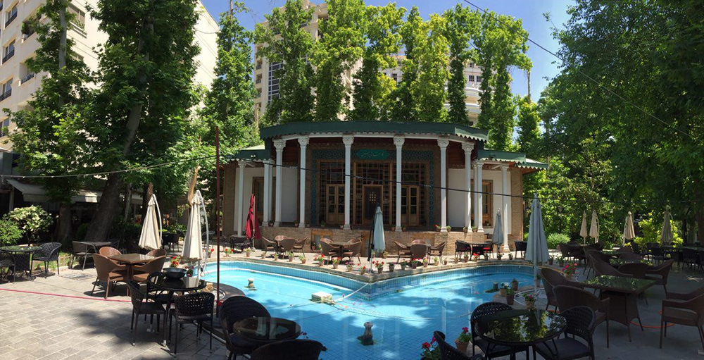 Amir Ahmadi's house in Iranian art museum gared